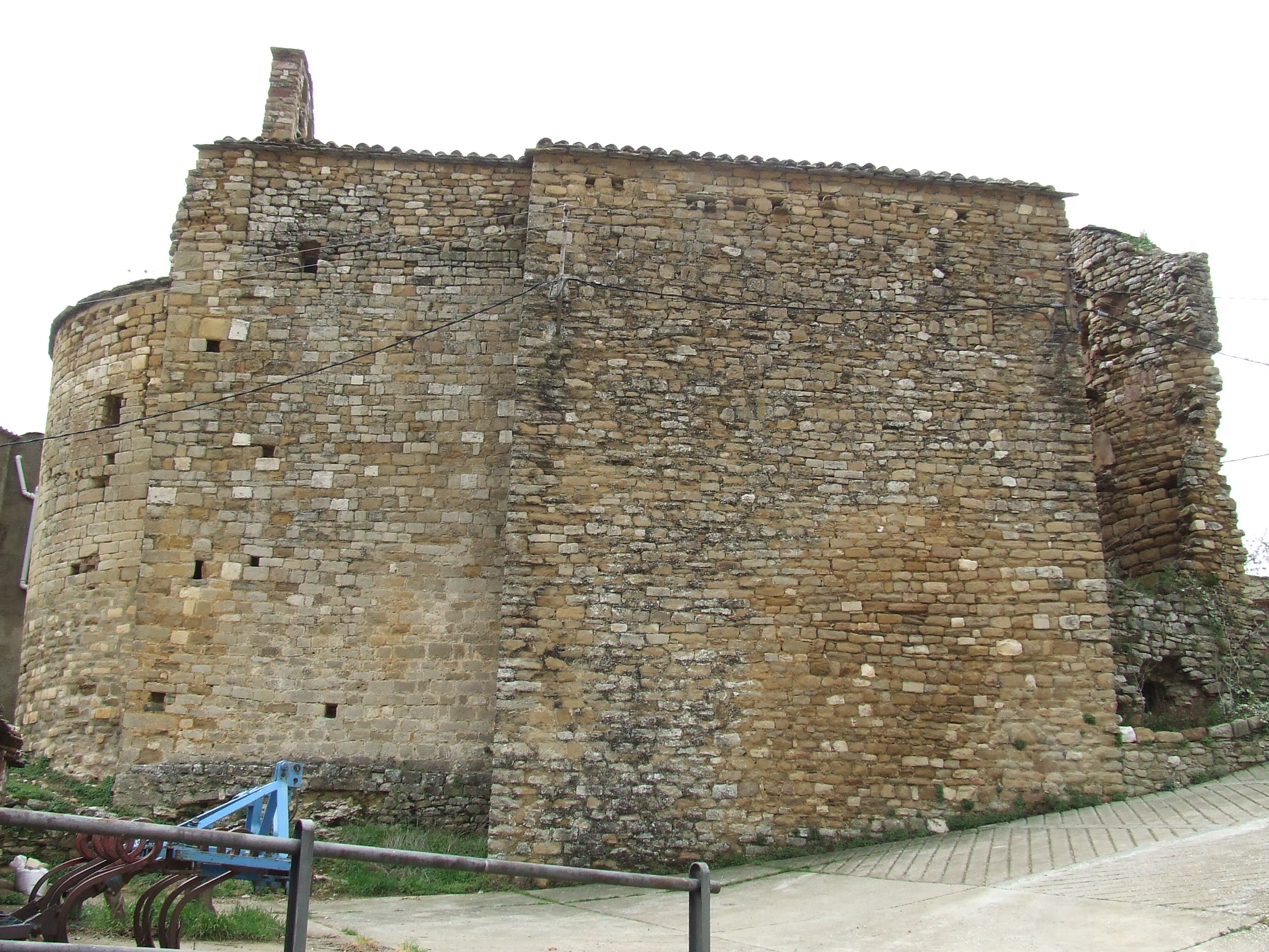 Façana meridional i porta de Sant Miquel de Moror (Sant Esteve de la Sarga, Pallars Jussà)